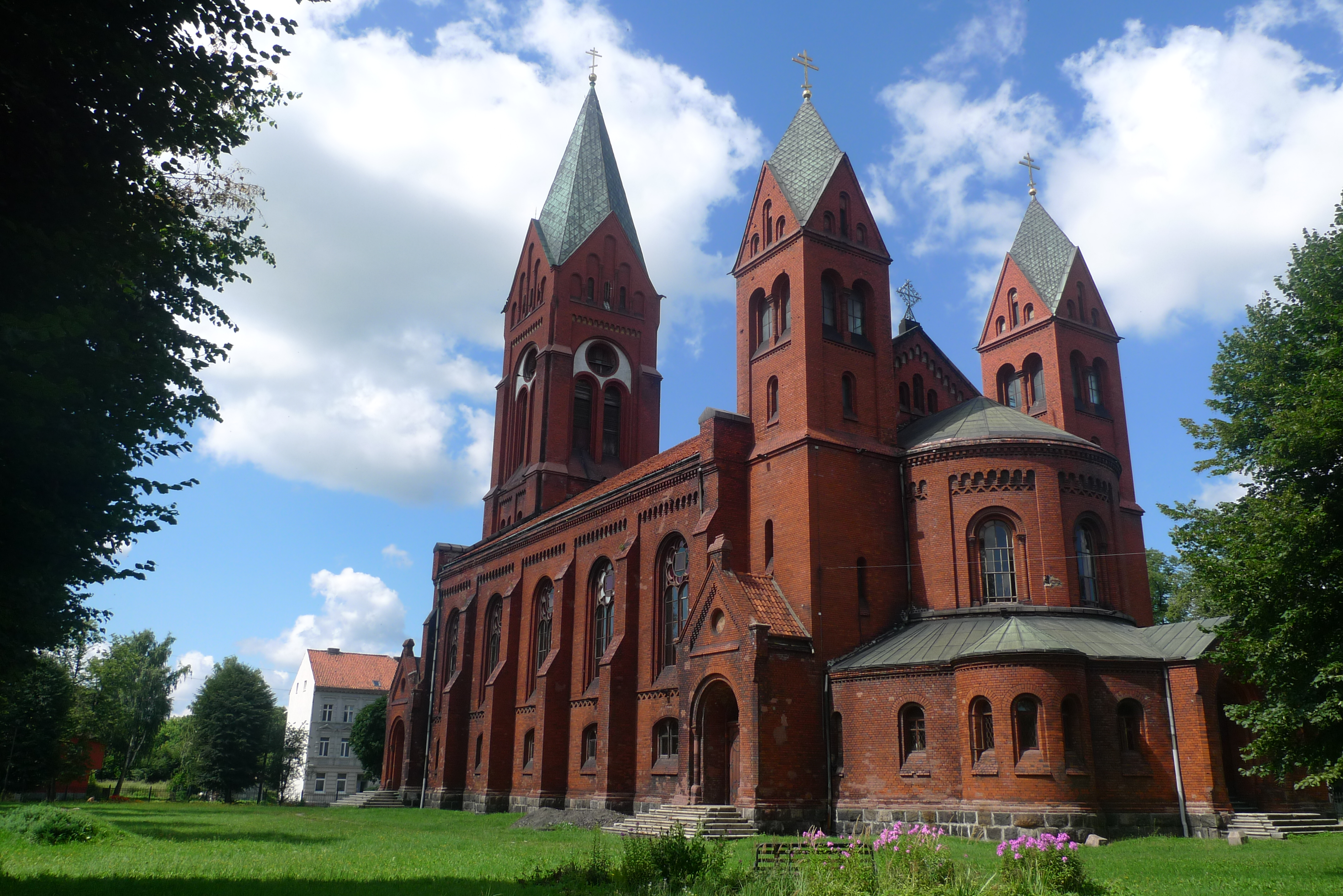 Кирха: улица Пионерская, 20, Черняховск, Черняховский район, Калининградская область